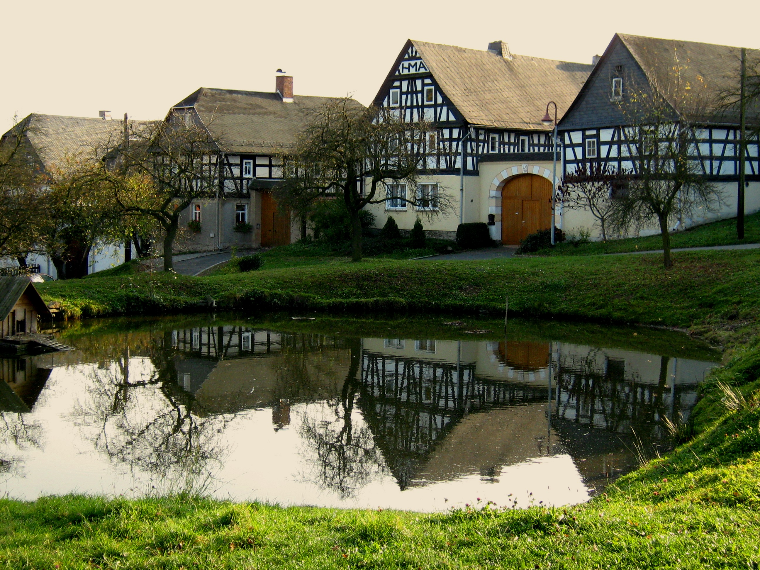 Nitschareuth im Thüringer Vogtland, mit 16 gestaffelt angeordneten Vierseithöfen mit Hoftorbögen, Wohnhäusern und Wirtschaftsgebäuden, 2.H.18.Jh. in Giebelstellung um zentralen Anger, massives EG, Fachwerkaufbau, Sattel-oder Krüppelwalmdächer